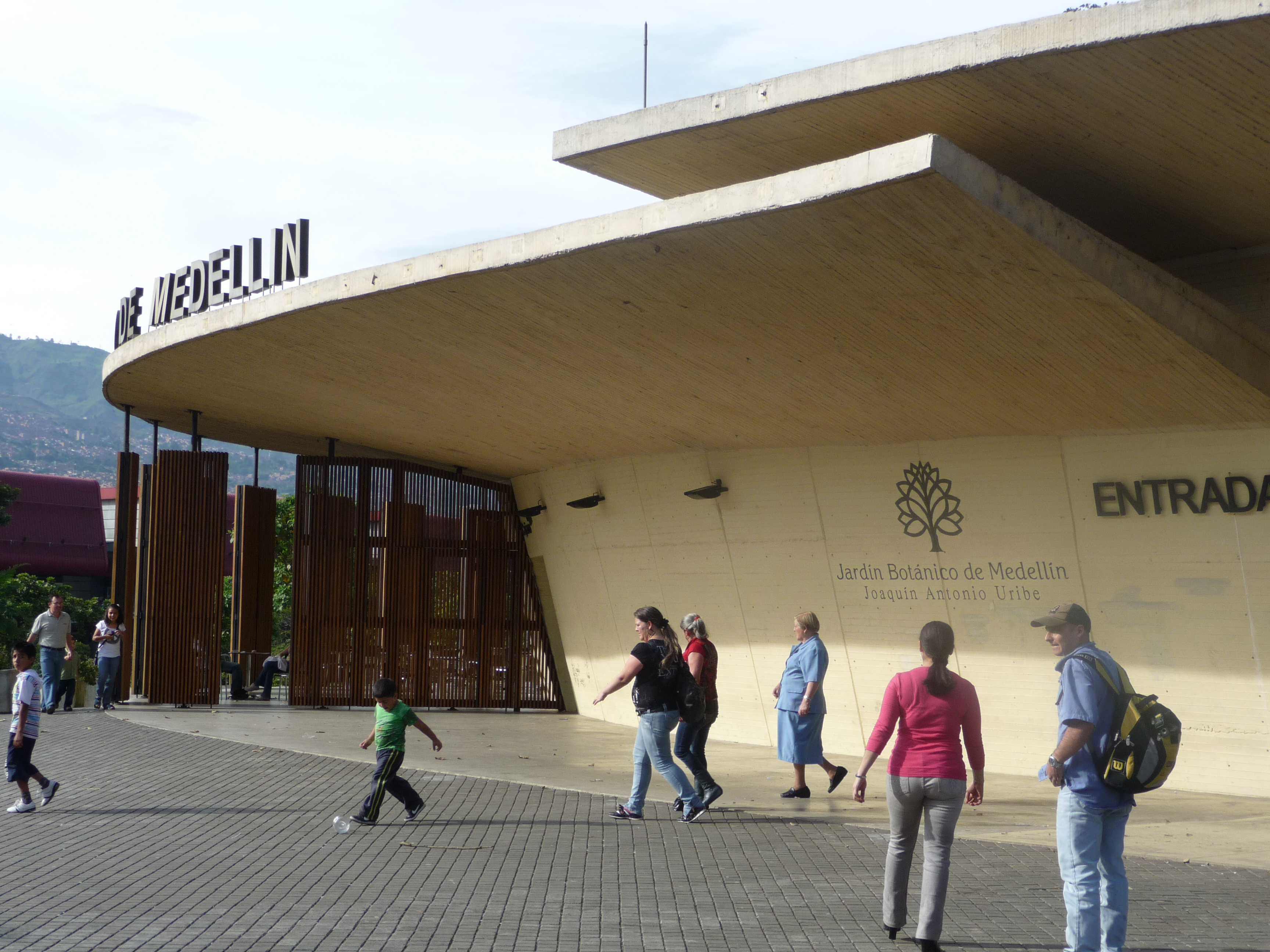 Ingreso al Jardín Botánico de Medellín, Lorenzo Castro y Ana Elvira Vélez